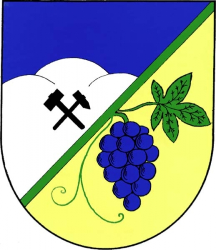 znak, Vinary, okres Ústí nad Orlicí